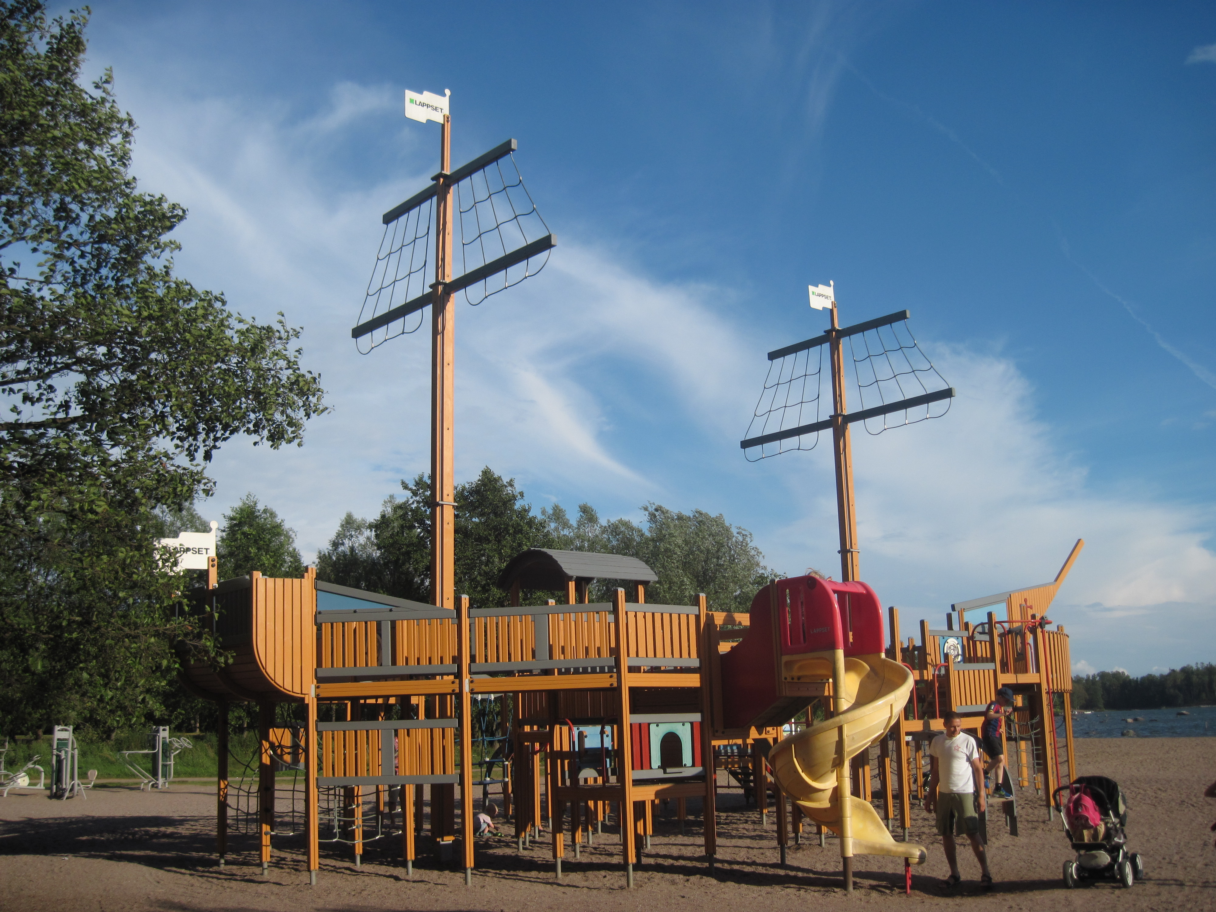 Silja Line's "Movement Ship" on Lauttasaari Beach, Helsinki